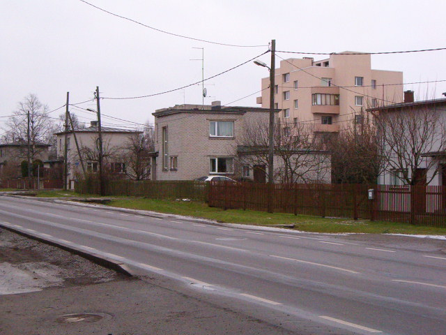 Erinevaid tüüpi eluhooneid Linnu teel. Tallinn